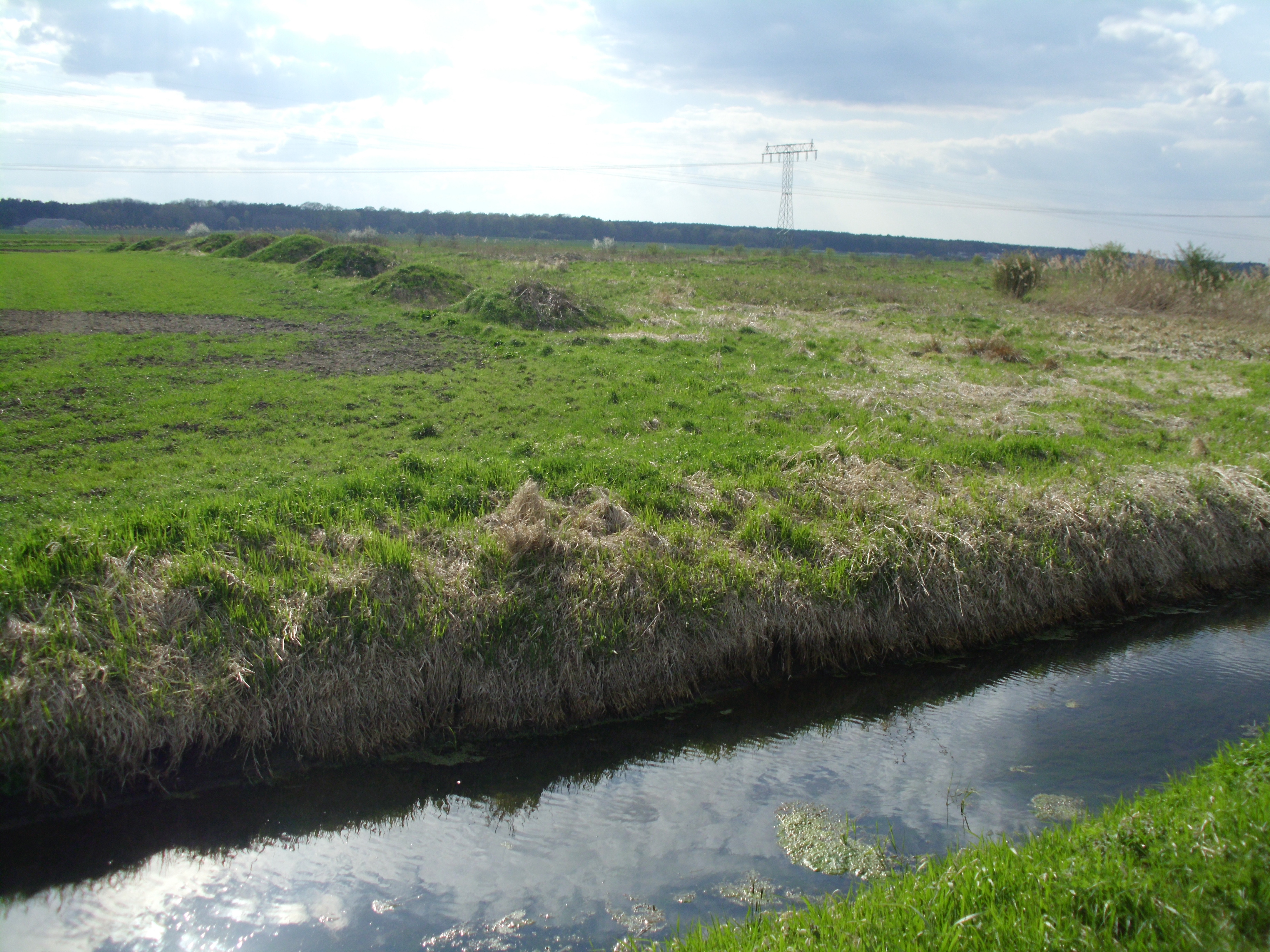 am „Groddisch“ bei Wiesenau, Amt Brieskow-Finkenheerd, Brandenburg, Deutschland